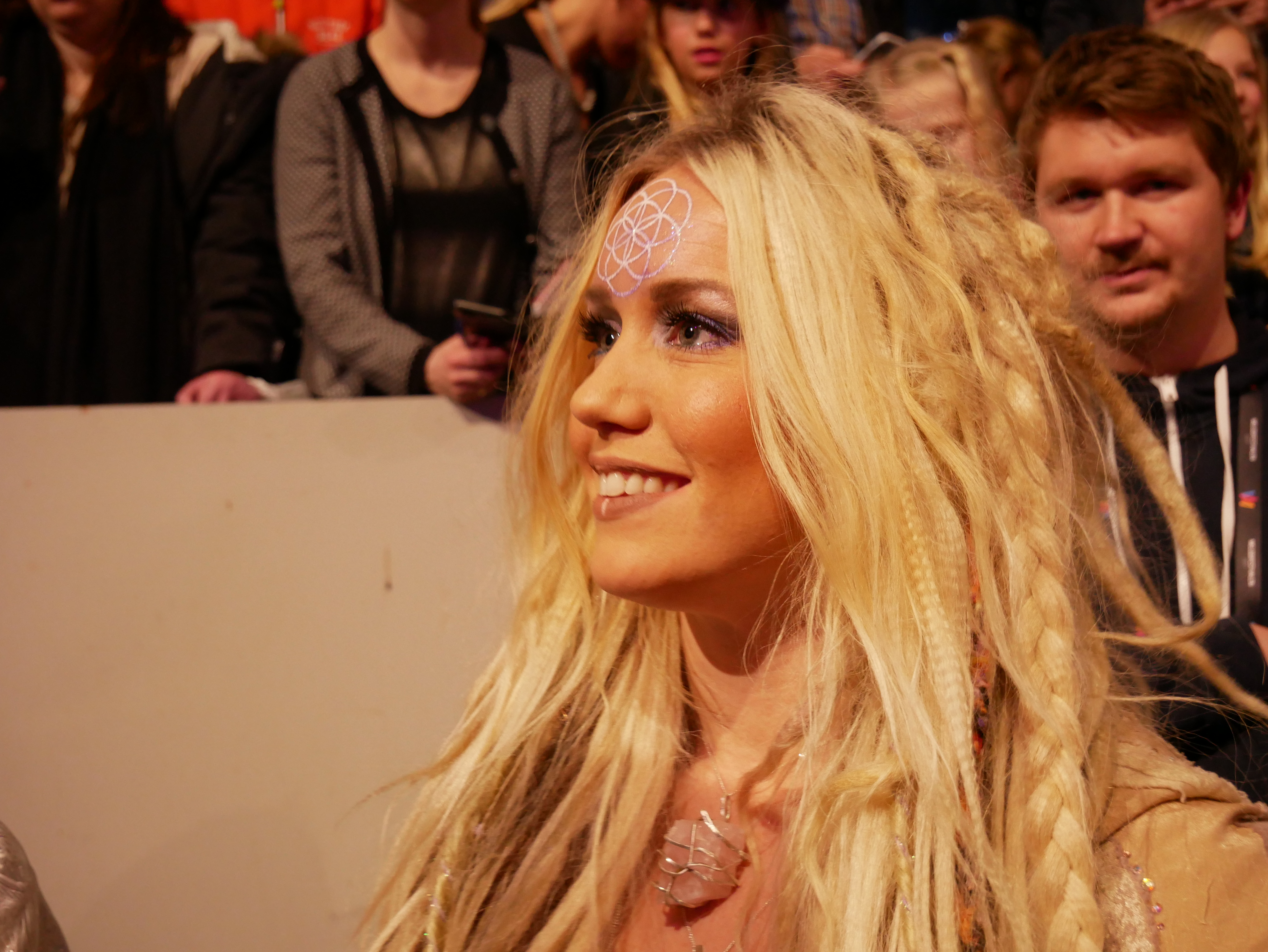 Melodifestivalen 2017, final Aninia